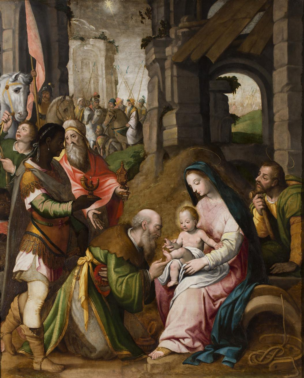 La obra representa el momento en que el Niño Jesús fue adorado por los tres Reyes Magos en presencia de sus padres.